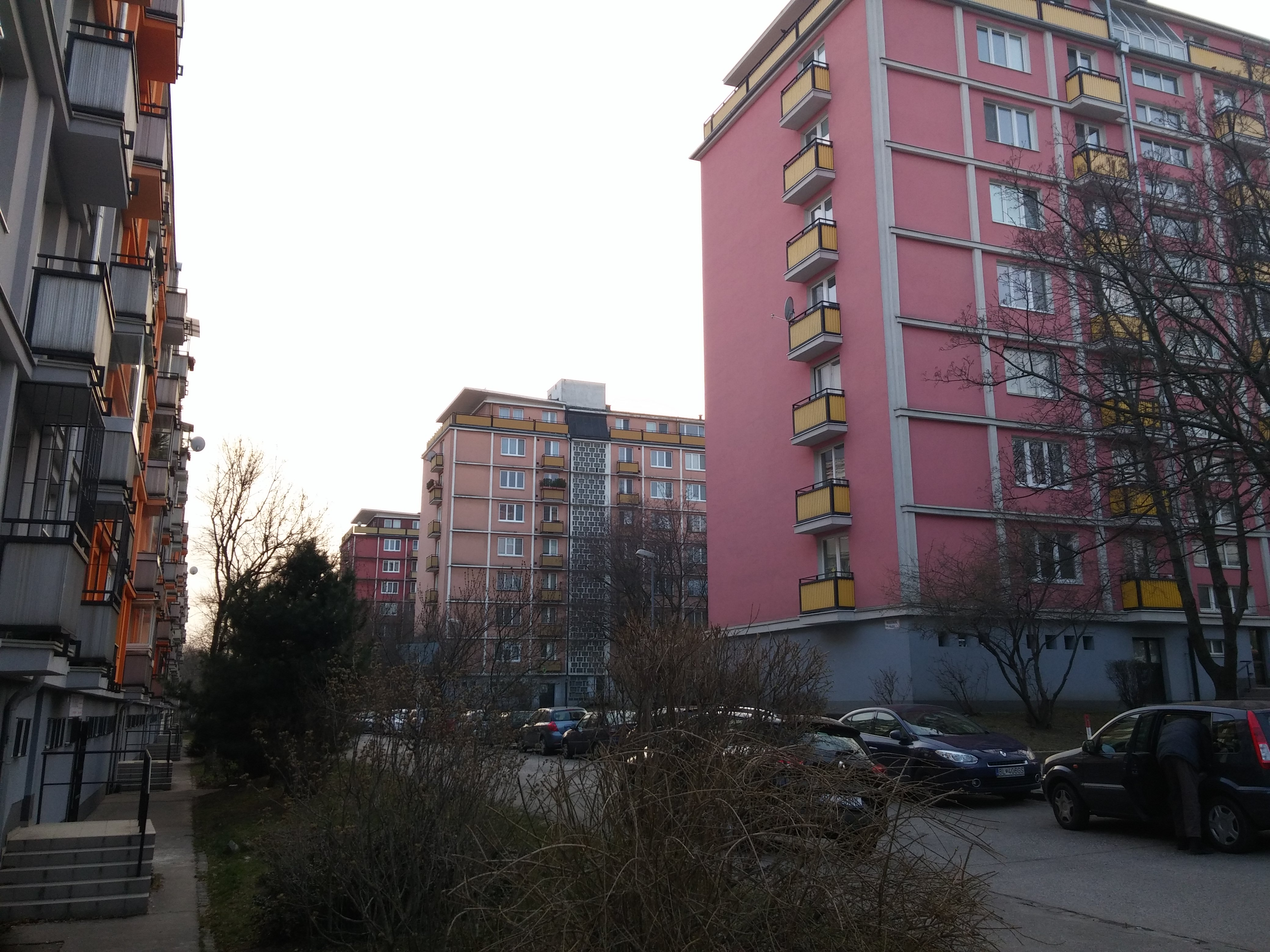 Sibírska, Nové Mesto, Bratislava